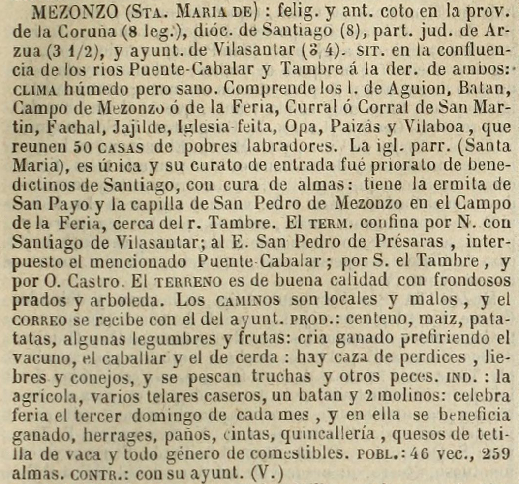 Mezonzo no Diccionario geográfico-estadístico-histórico de España y sus posesiones de Ultramar.